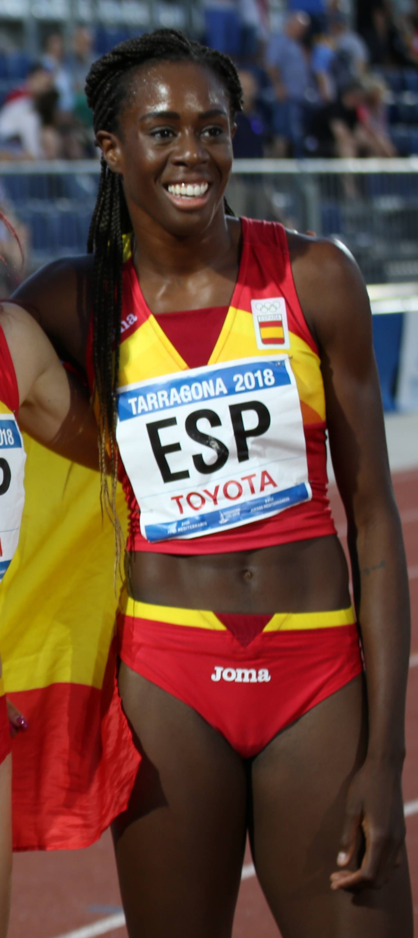 Aauri Bokesa en los relevos 4x400 en los Juegos del Mediterráneo 2018